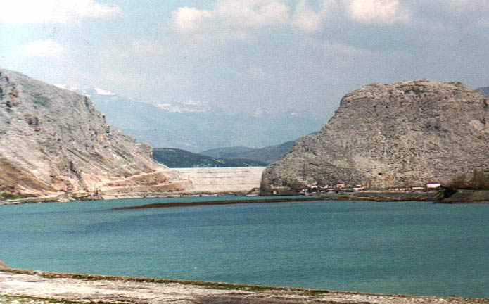 Blick von Westen über den Unterlauf des Drin auf die Staumauer von Vau-Deja in Nordalbanien. Im Hintergrund sind die Albanischen Alpen zu erkennen.